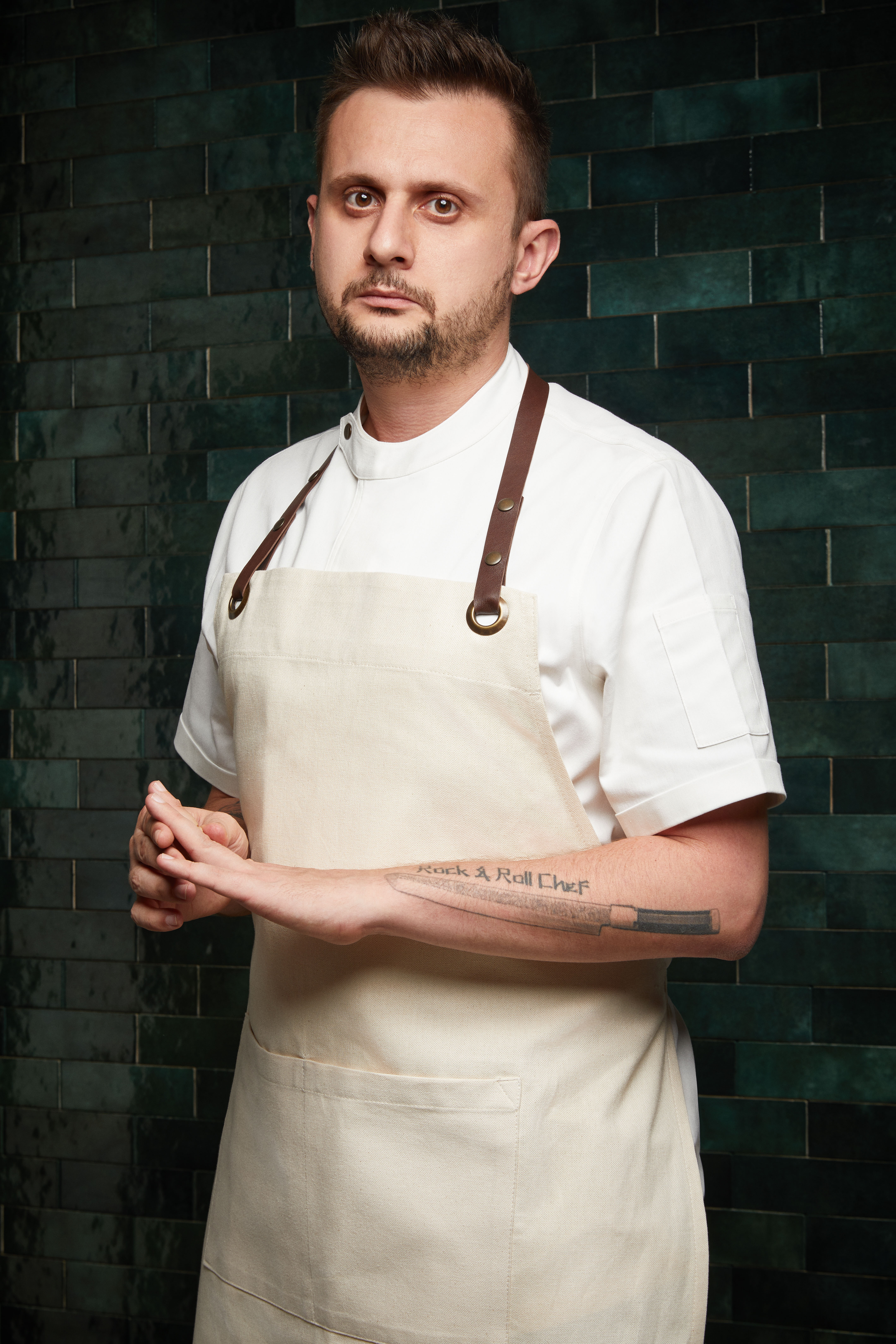 Turk Fatih Tutak'ın Şefi